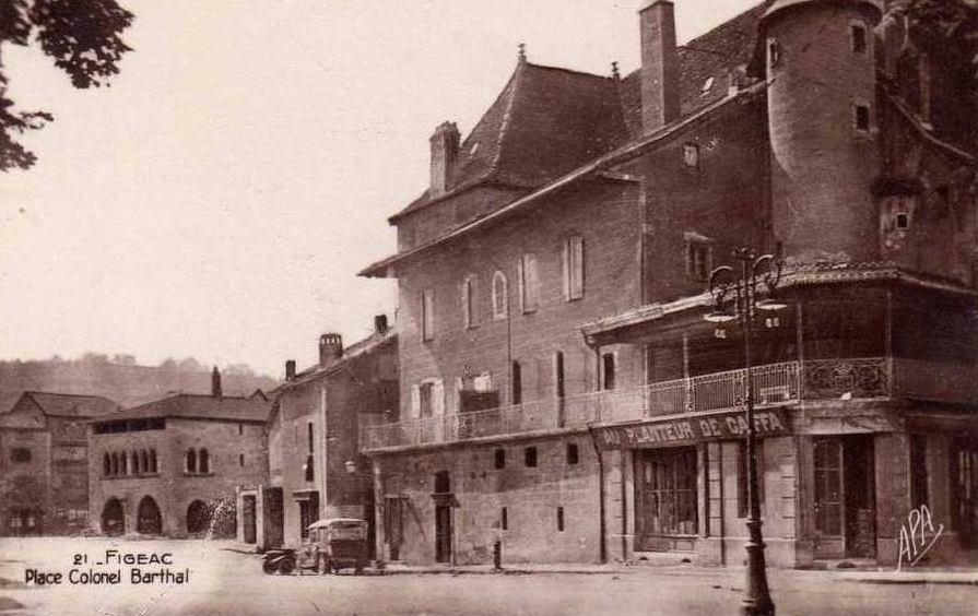 Succursale du Planteur de Caïffa à Figeac (Lot) vers 1905